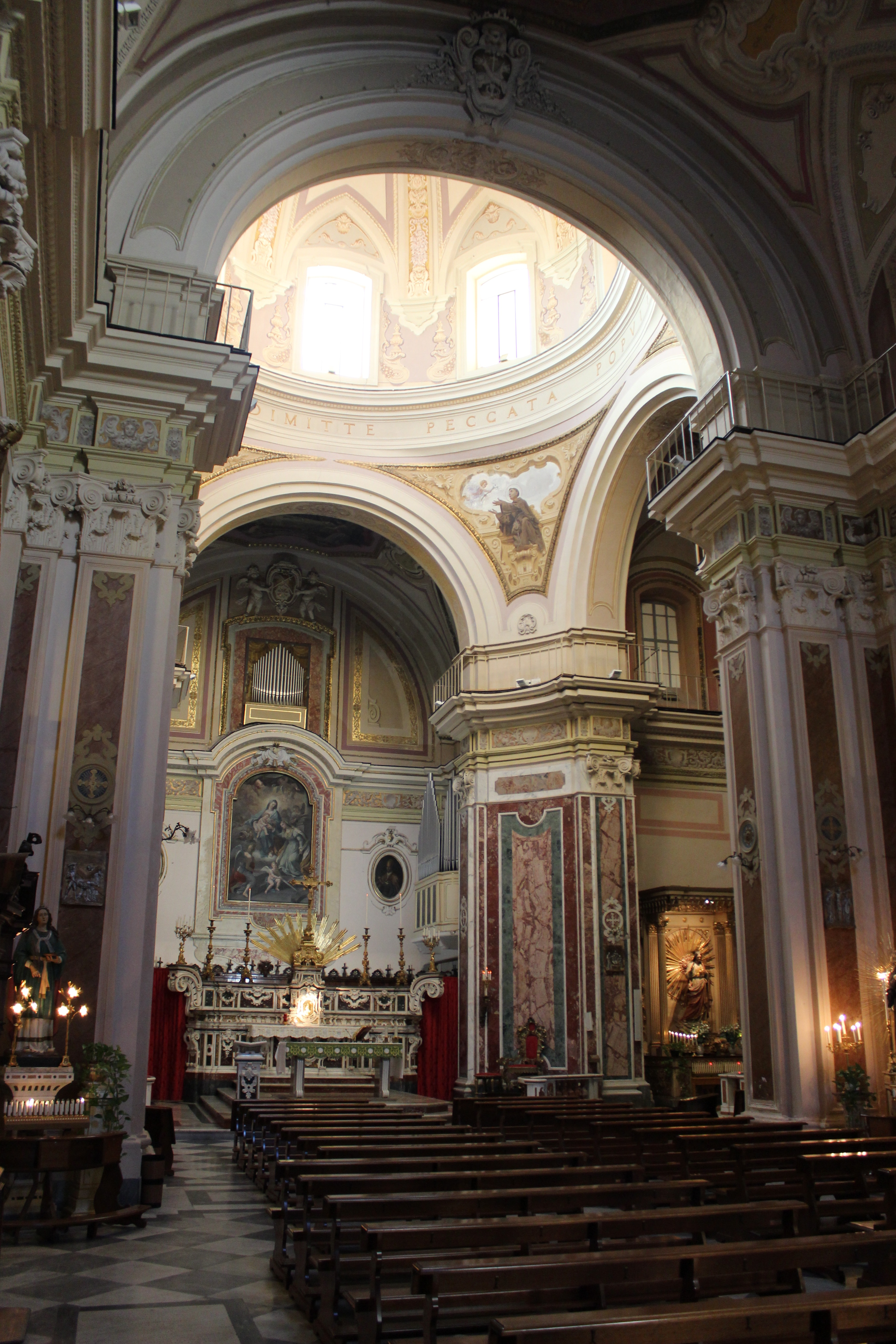 Santa Caterina a Chiaia. Interior.